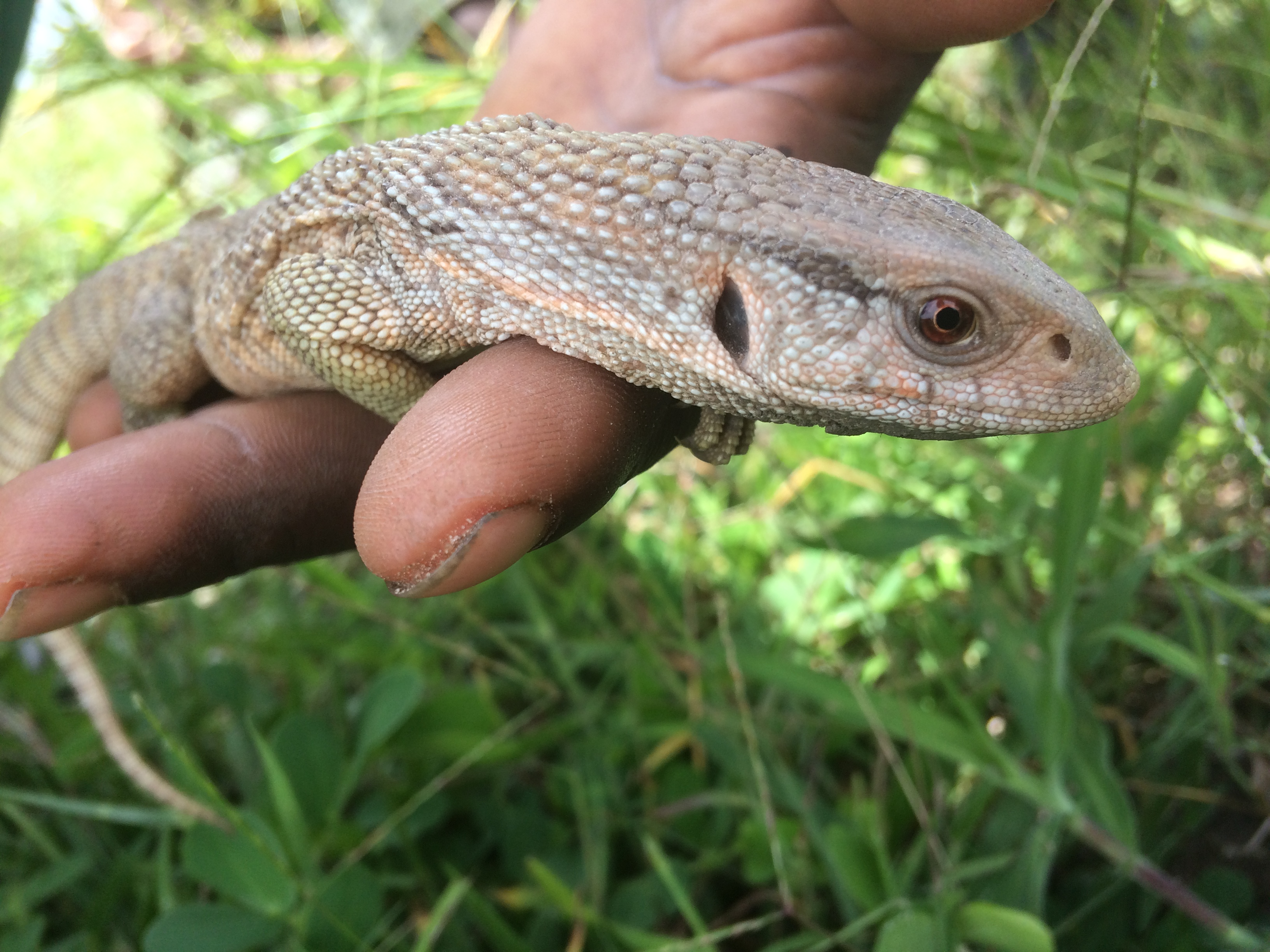 En ung vild stäppvaran (Varanus exanthematicus) som blev vägd och måttad.